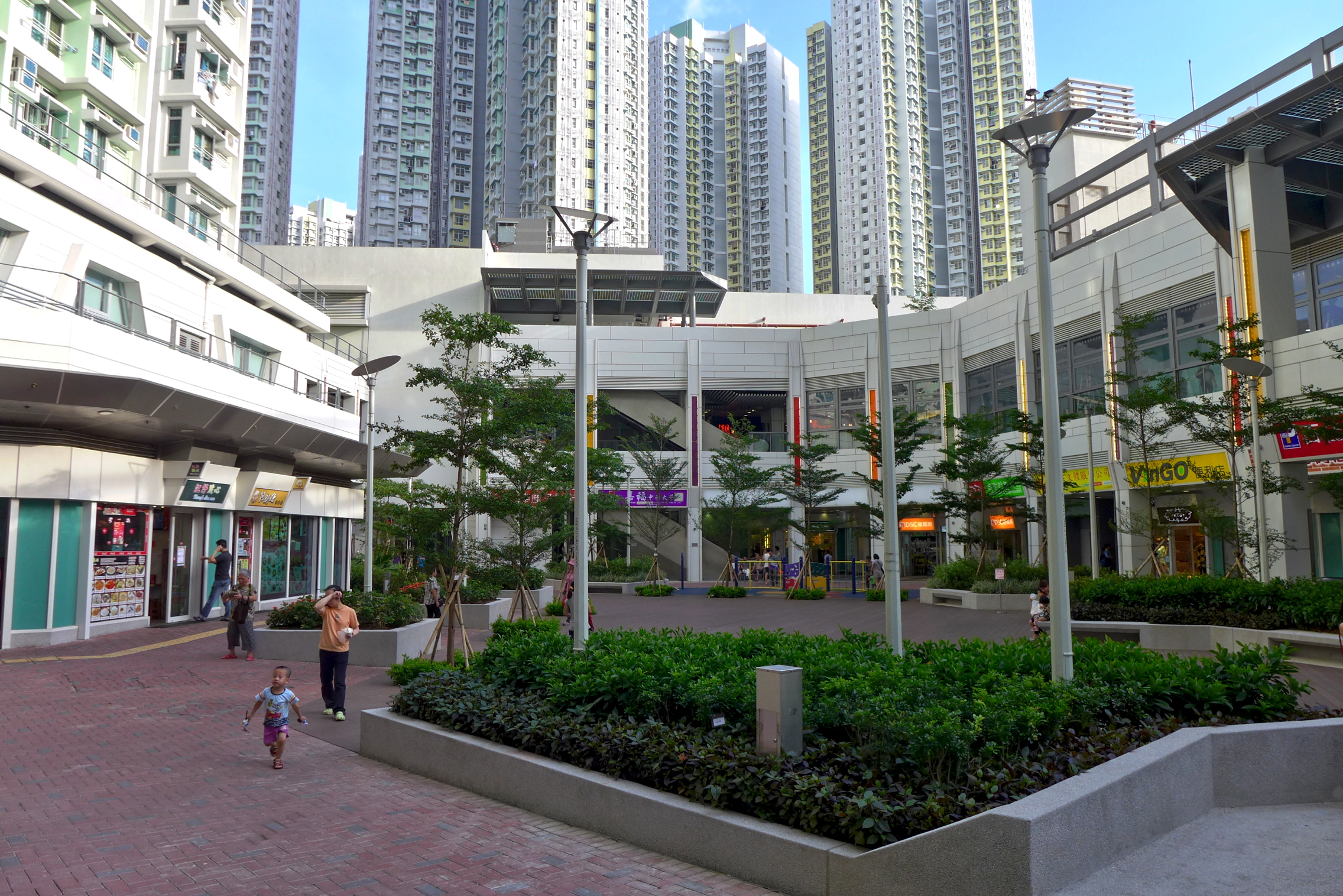 Kai Ching Estate Garden